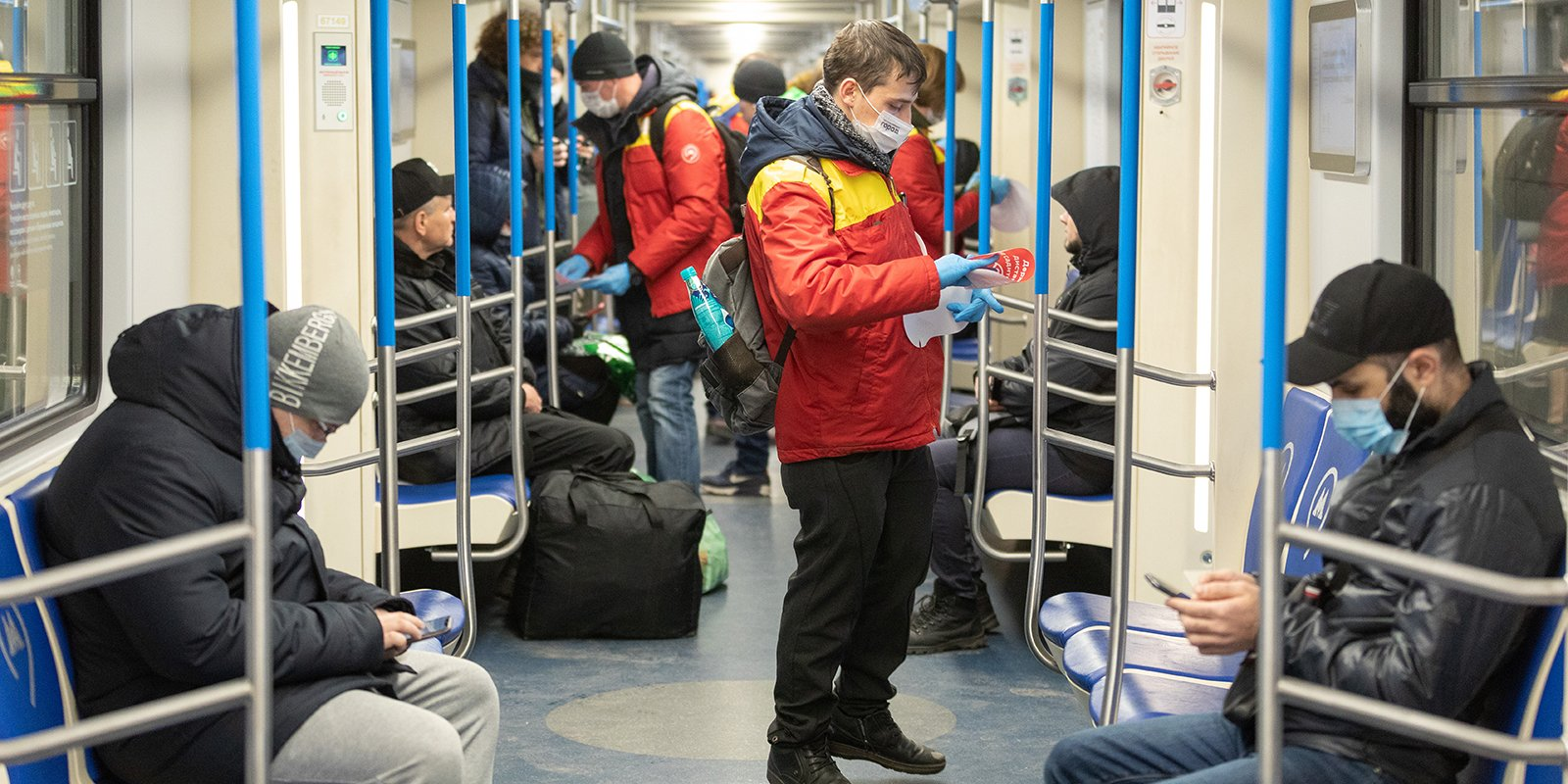 Март-апрель 2020, период пандемии COVID-19. На станциях метро и Московского центрального кольца (МЦК) начали наносить красную разметку для соблюдения горожанами дистанции в полтора — два метра. Ее можно увидеть в вагонах поездов, а также рядом с кассами и на платформах станций, на которых наблюдается наиболее высокий пассажиропоток. Всего будет размещено более 110 тысяч предупреждающих стикеров и свыше 20 тысяч погонных метров контрастных полос. Также специальные указатели наклеят в вагонах поездов метро. Круглые стикеры, размещенные через одно пассажирское кресло, помогут пассажирам соблюдать безопасное расстояние во время поездок. Аналогичная навигация появится и в «Ласточках», которые курсируют на МЦК.